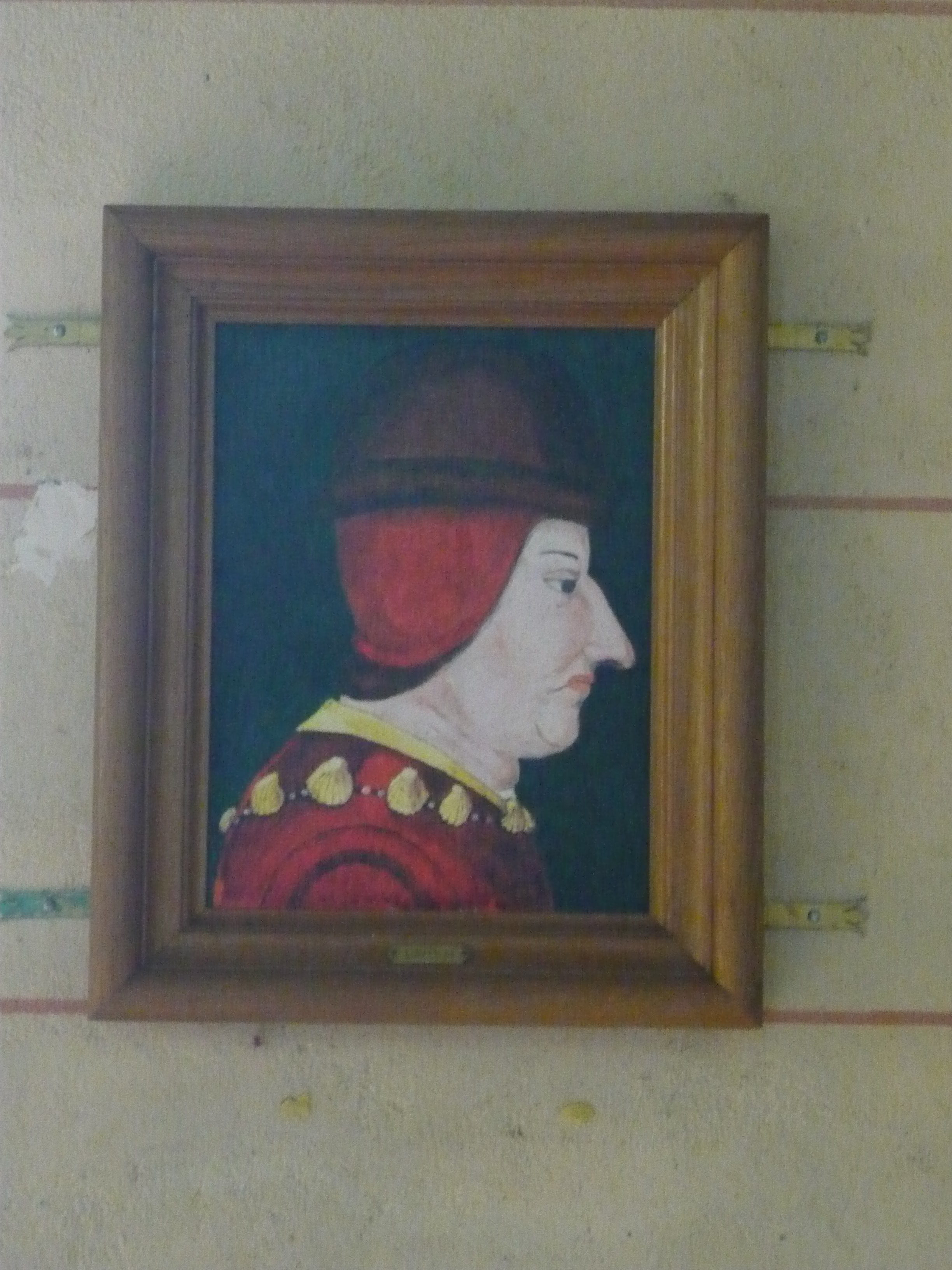 Portrait de Louis XI (chapelle Ste-Emerance)